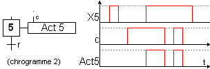 Diagramme temporel pour expliquer l'action conditionnelle d'un Grafcet.